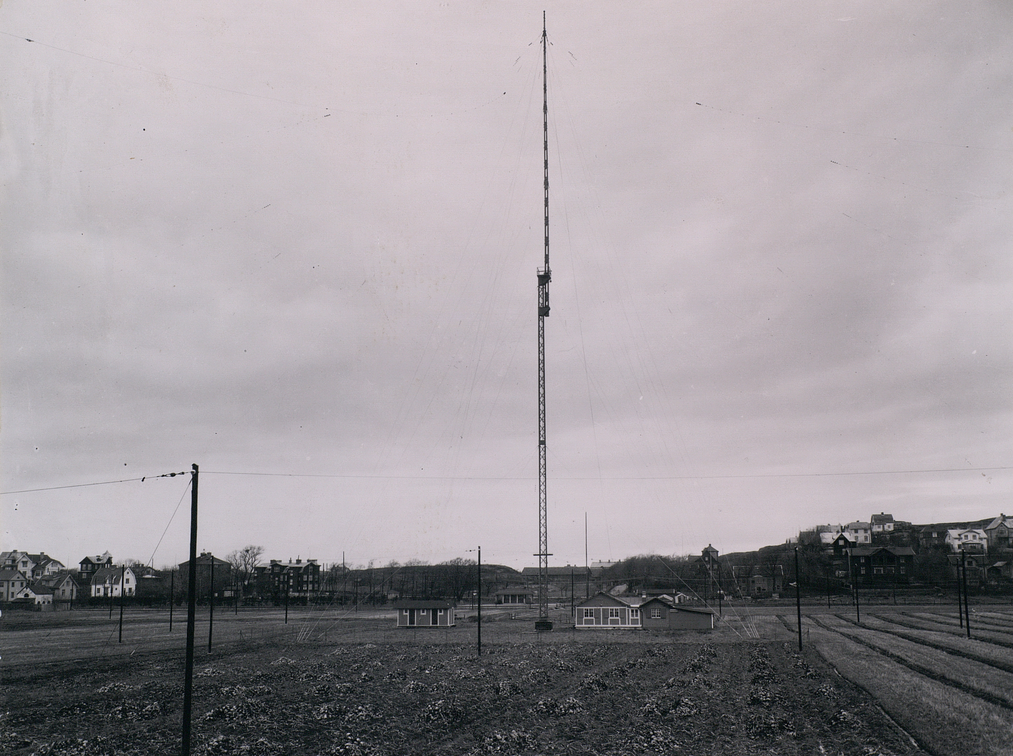 Göteborg, Nya varvet, kustradiostation på Gnistängen aktiv 1911-1948. Exteriör.